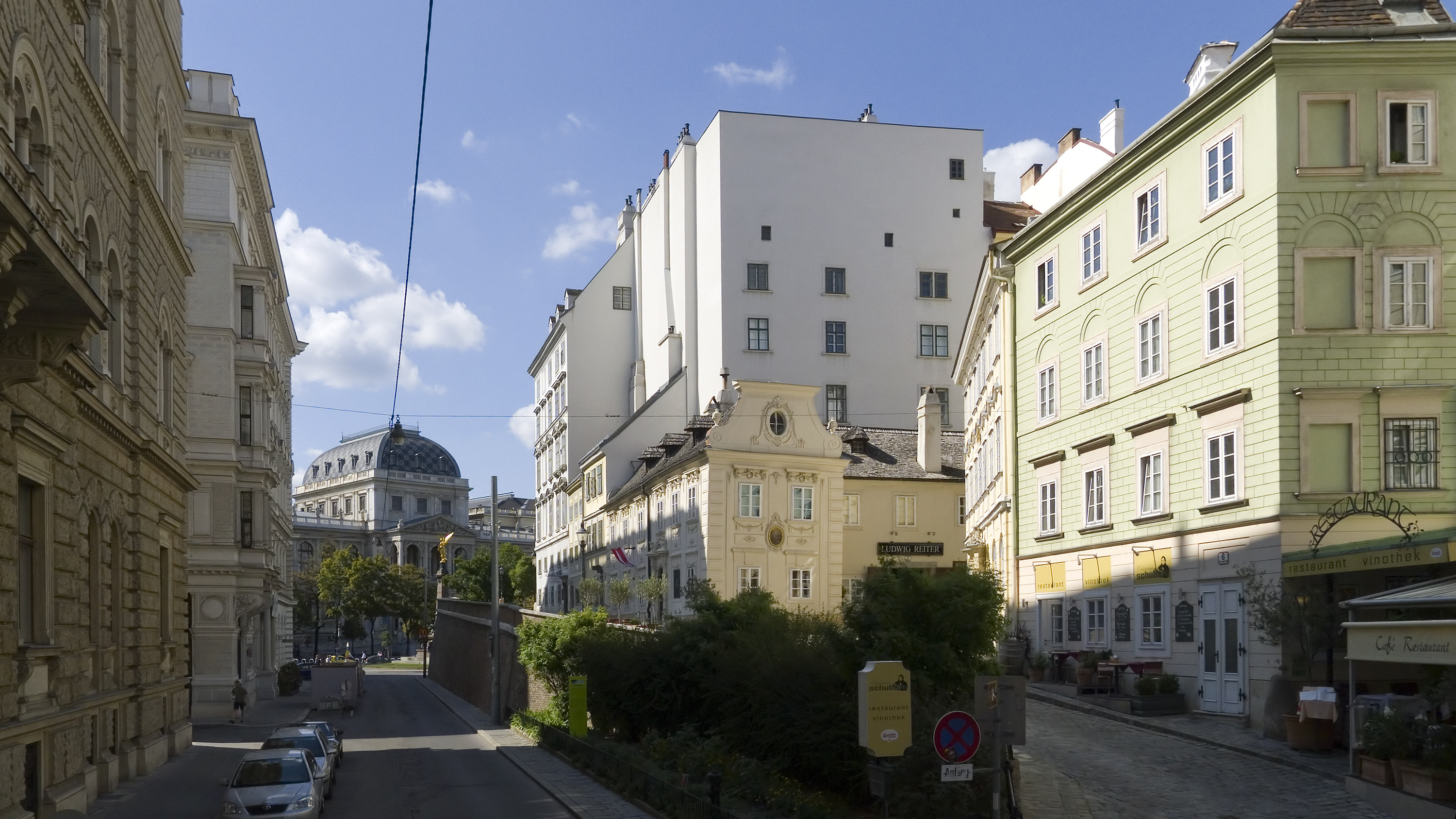 Schreyvogelgasse in Wien 1 bei Nr. 2 Richtung Nordwesten